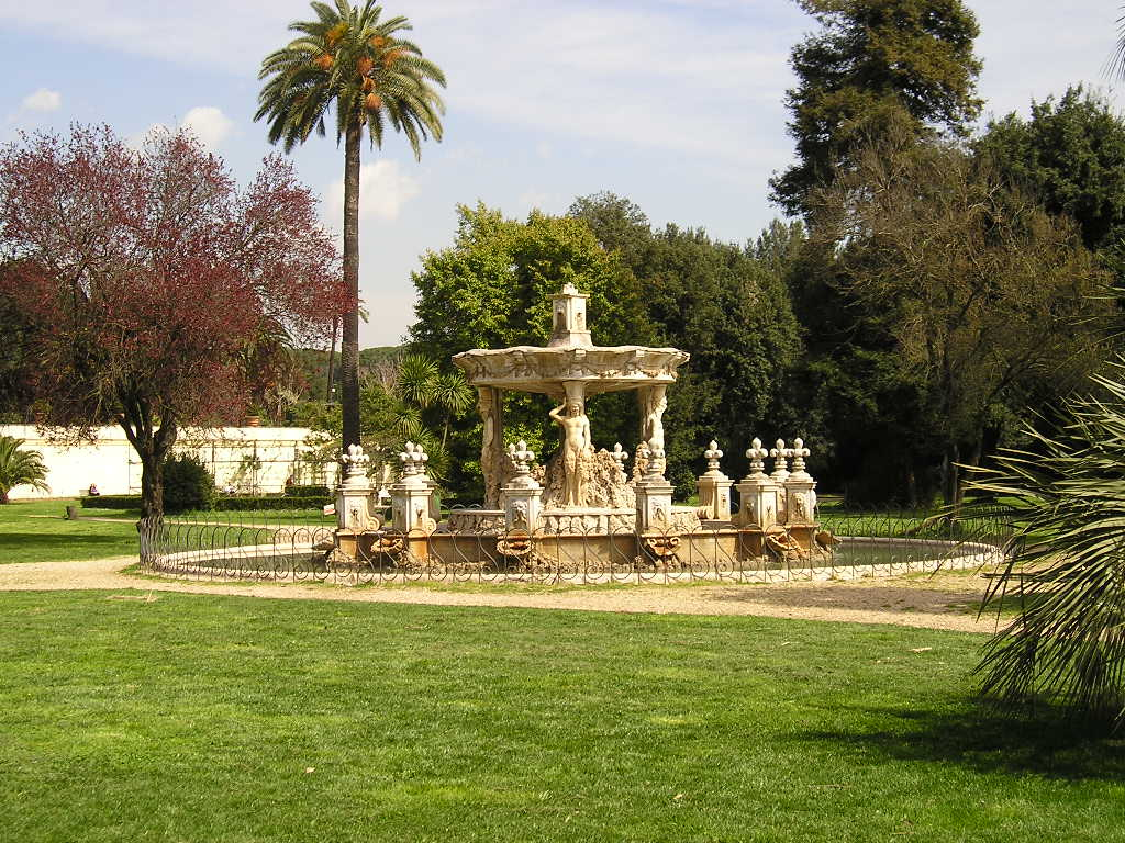 Fontana nel giardino di fronte alla villa